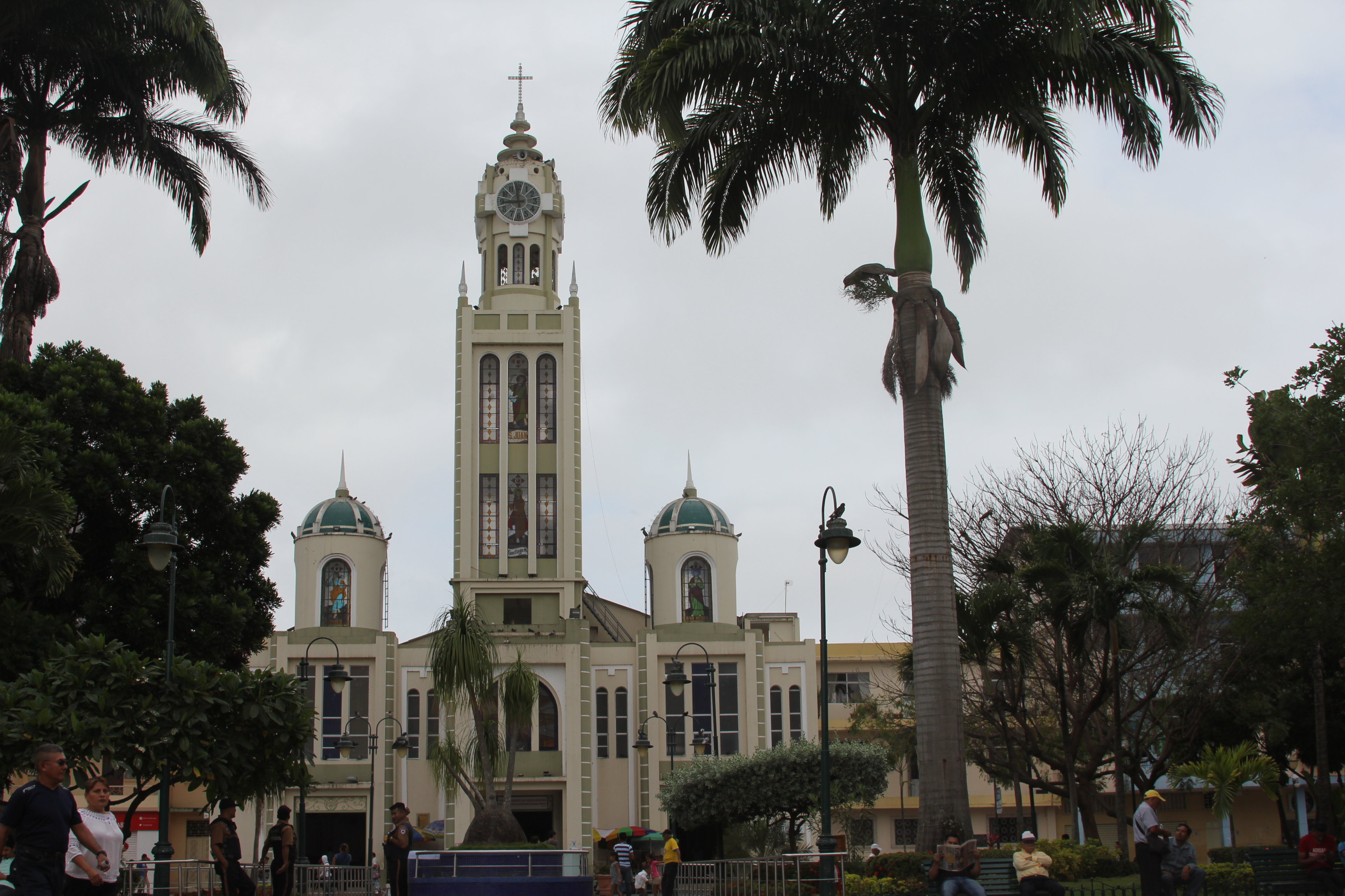 El Oro Machala 008